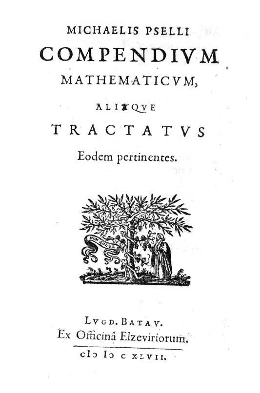 Michaelis Pselli Compendium mathematicum, aliaque tractatus eodem pertinentes. - Lugd. Batav. : ex officina Elzeviriorum, 1647. - [16], 252, [4] p. ; 8º. - Contiene opere di Federico Commandino, Aristotele, Francesco Maurolico, Konrad Dasypodius e Willebrord Snell come figura sul verso di carta 2 .